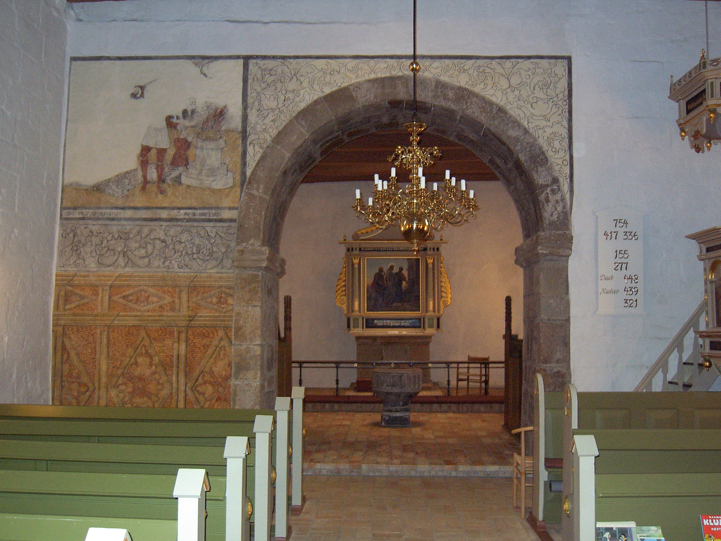 Skibet, kalkmaleriet og koret i Hover kirke